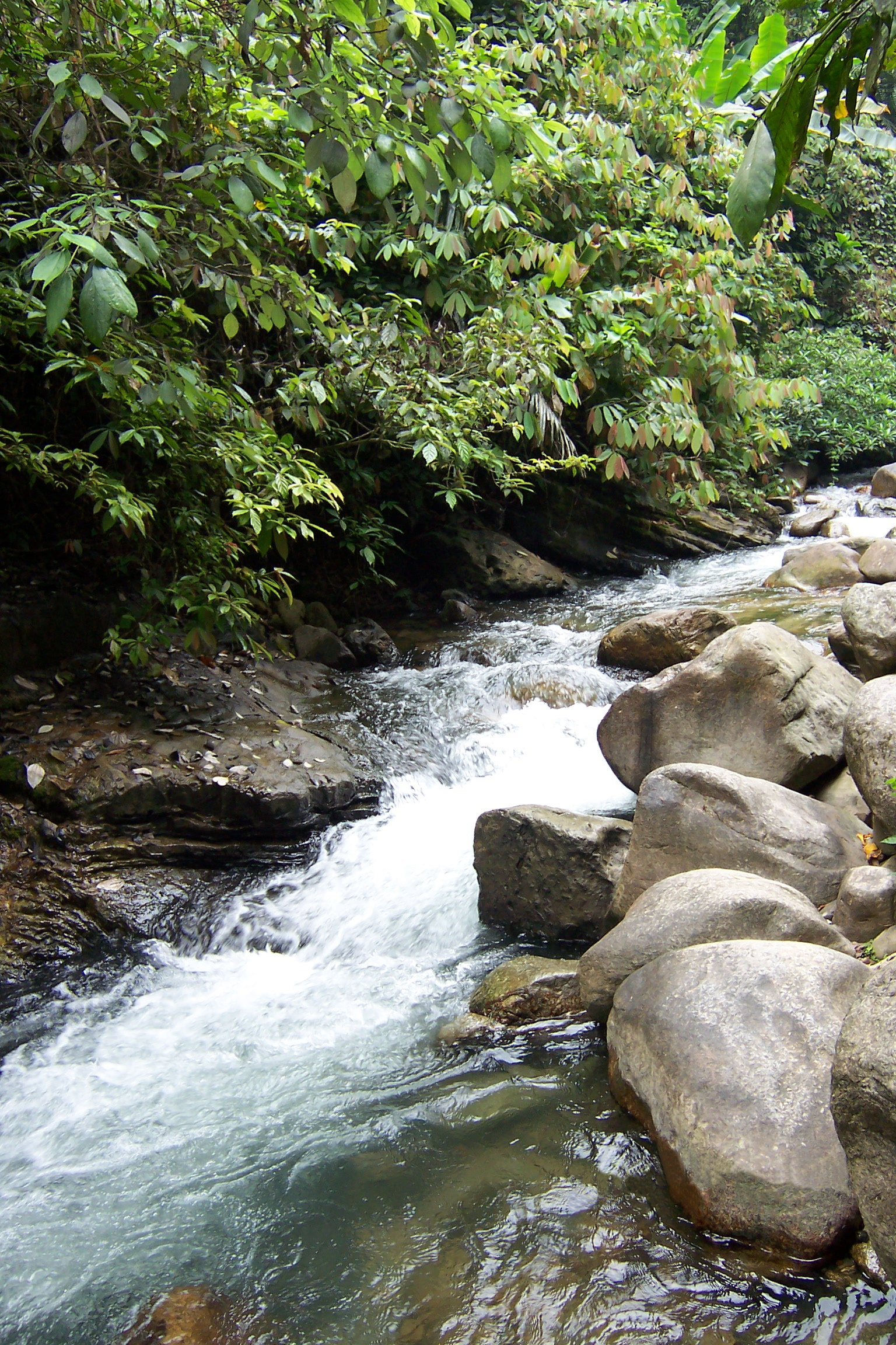 中國廣西省通靈大峽谷的一條溪水/ TongLing canyon, JingXi, GuangXi, China